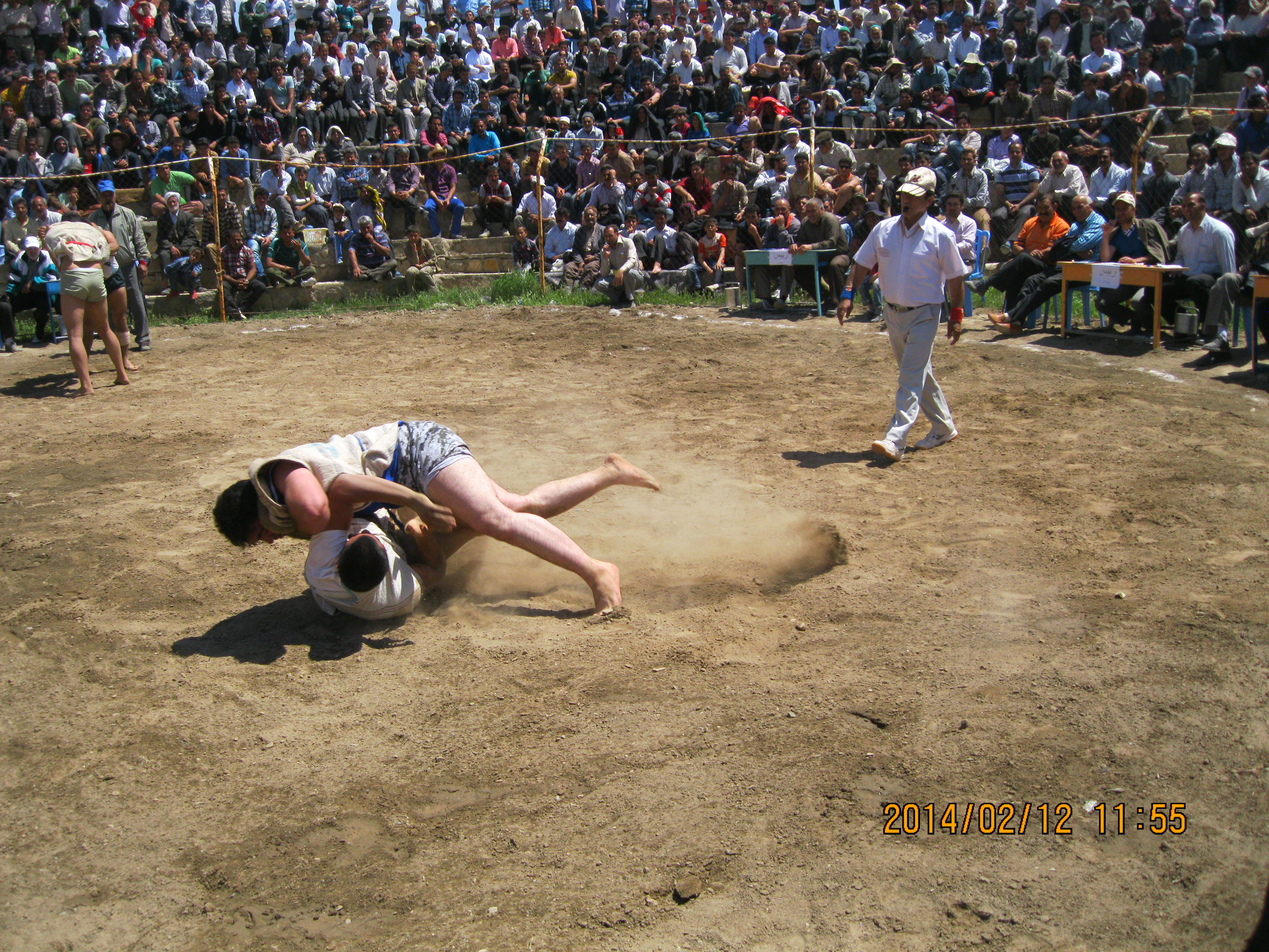 گود کشتی با چوخه پلهوان سخدری روستای حاجی‌آباد زبرخان نیشابور 12 اردیبهشت 1393- عکس: علی محمدی